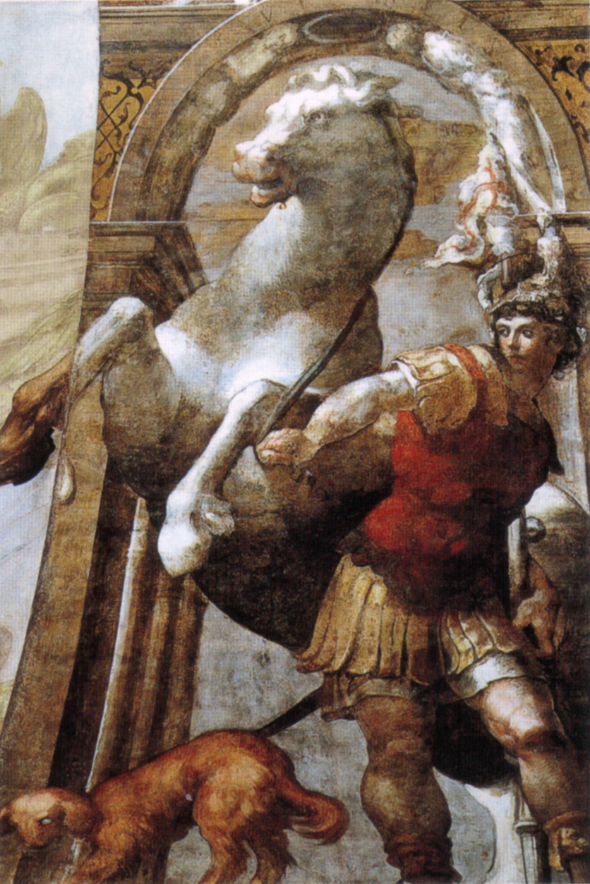 San Vitale